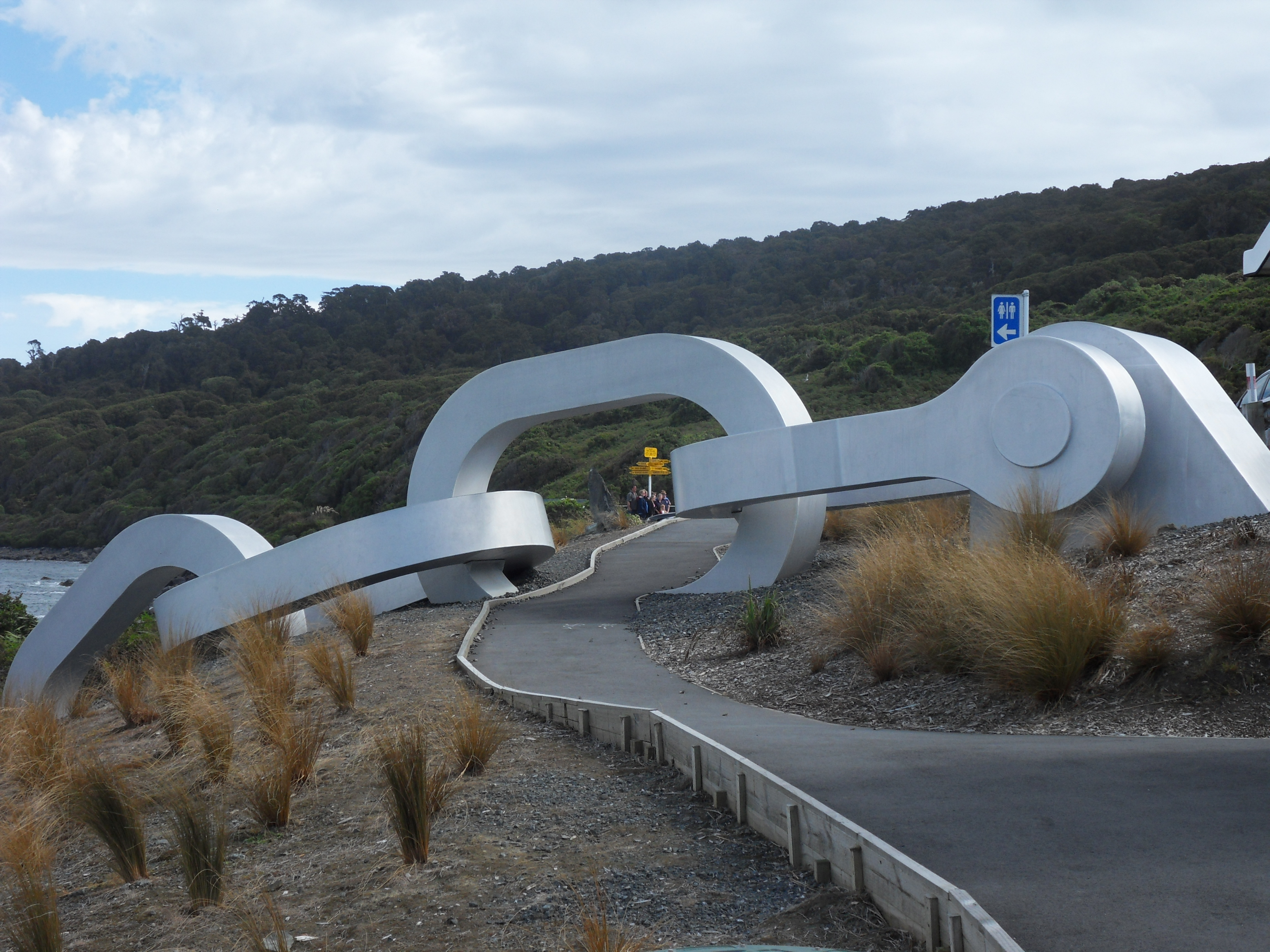 De grote ketting die bij het panorama van Bluff staat met de wegwijzer in de verte.